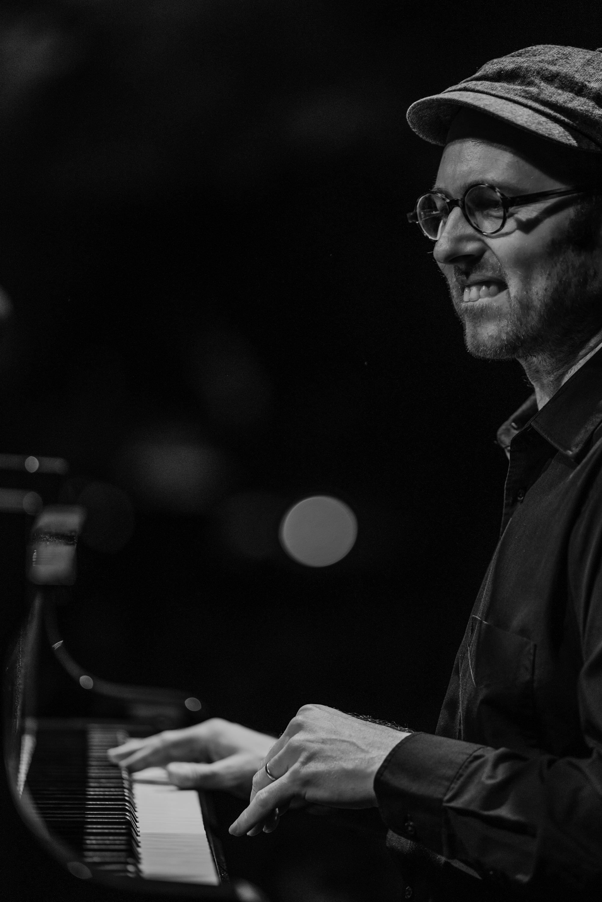 GEORGE COLLIGAN Threesome • Boris KOZLOV / Low • Rudy ROYSTON / Battery • George COLLIGAN / Piano Special guest: • Nicole GLOVER / Tenor Saxo 22 Festival Internacional de Jazz de Punta del Este. El Sosiego, Punta del Este, Maldonado, Uruguay. Camera: NIKON D810 Lens: Zeiss Apo Sonnar T* 2/135 ZF.2 0 ISO: 800